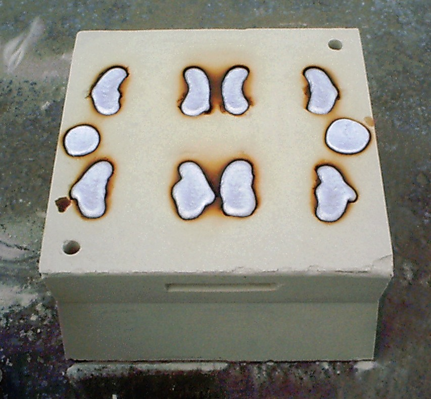 Photo prise par mes soins pour illustrer l'article "fonderie d'aluminium" Vue d'un moule en sable à prise rapide dans lequel on vient de couler